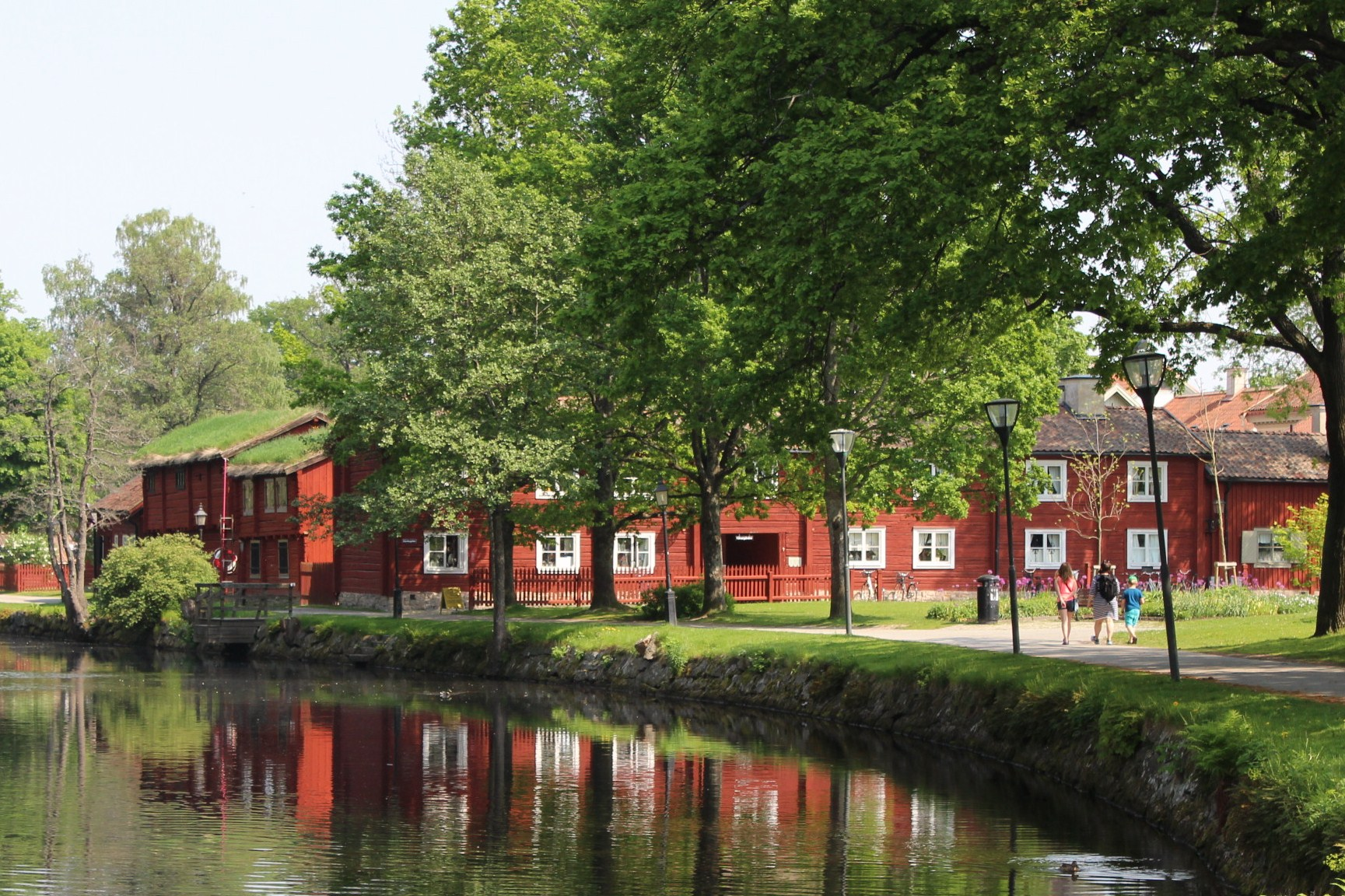 Svartån, Örebro, i förgrunden, bakom lövverken skymtar Vävaregården som ingår i museimiljön Wadköping